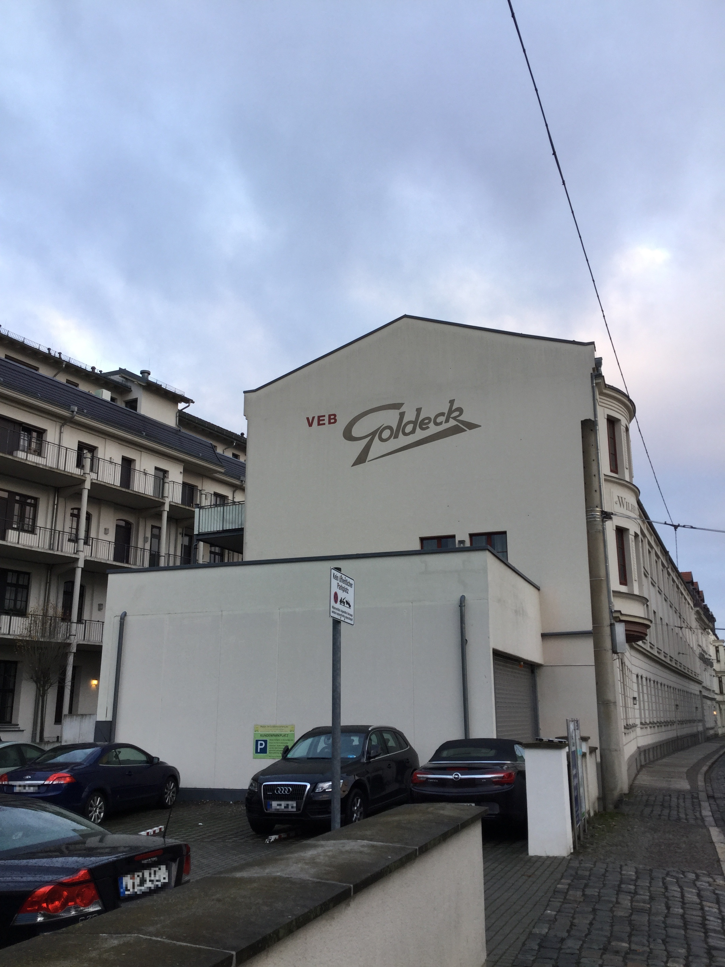 In der ehemaligen Fabrik in der Menckestraße 33 in Leipzig Gohlis sind heute Loft-Wohnungen untergebracht.